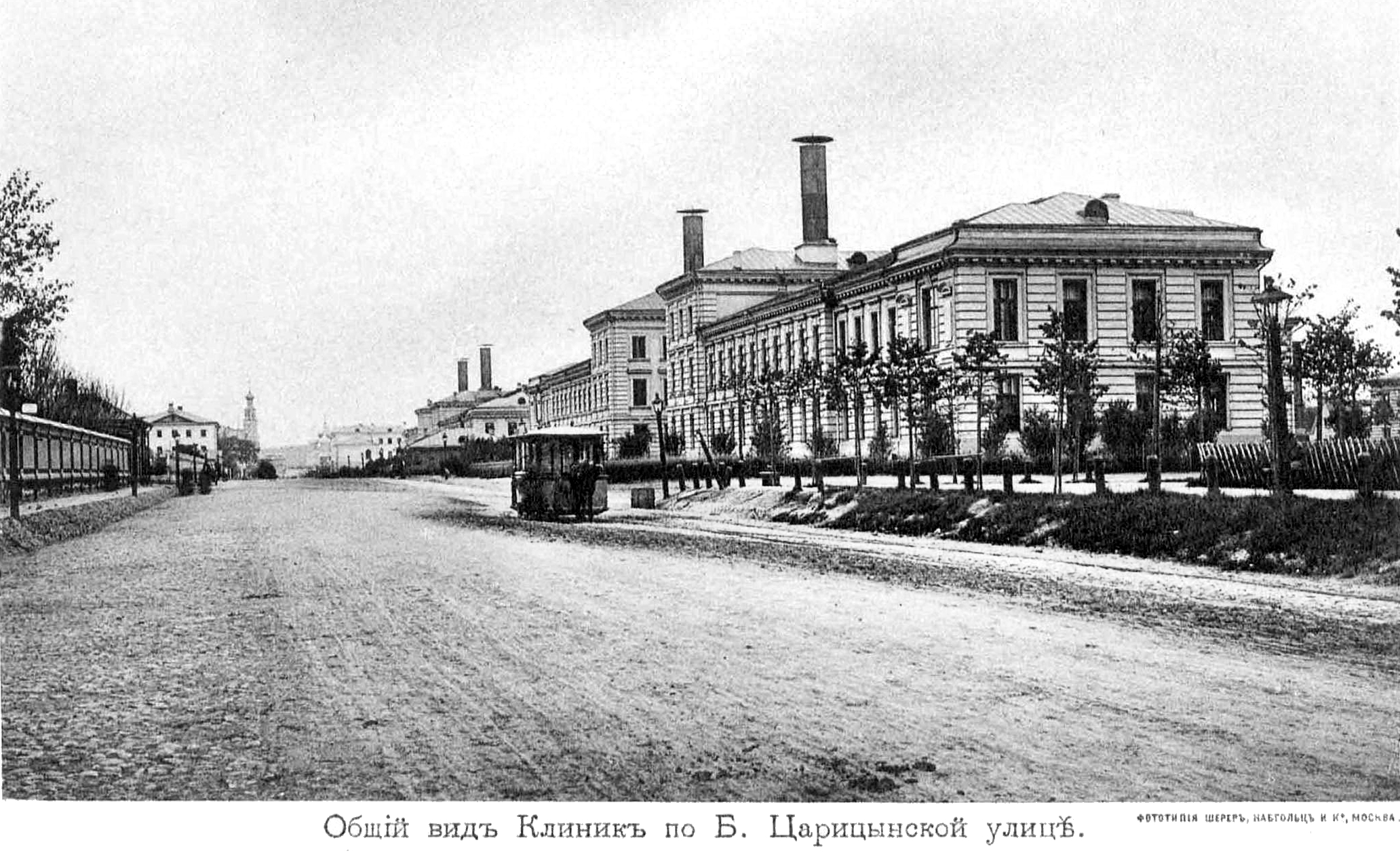 Общий вид клиник по Большой Царицынской улице в 1895 году